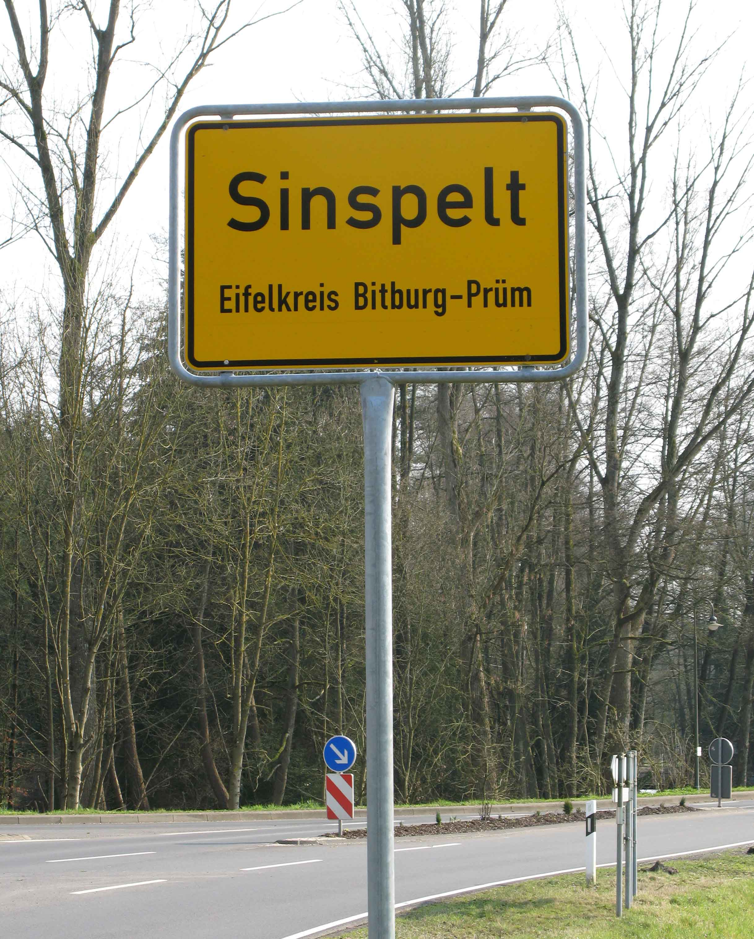 Sinspelt.